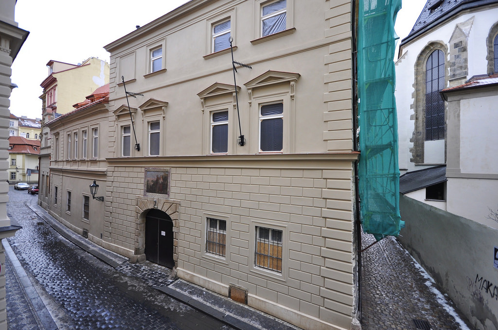 U Voříkovských, Liliová 219/5, Zlatá 219/6, Staré Město (Praha).